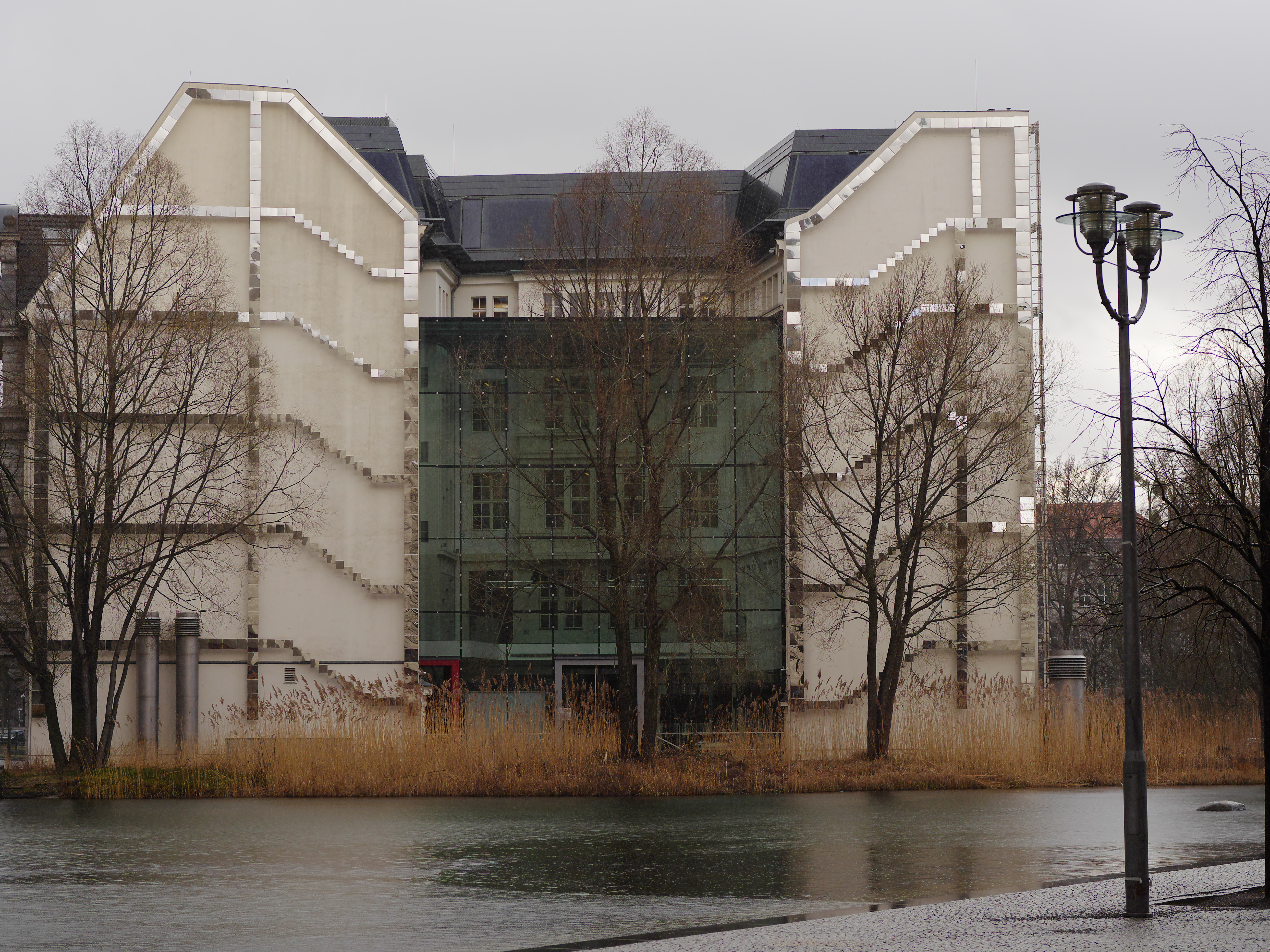 „Windspiegelwand“ von Olafur Eliasson an der Nordfassade des GTZ-Hauses in Berlin-Tiergarten